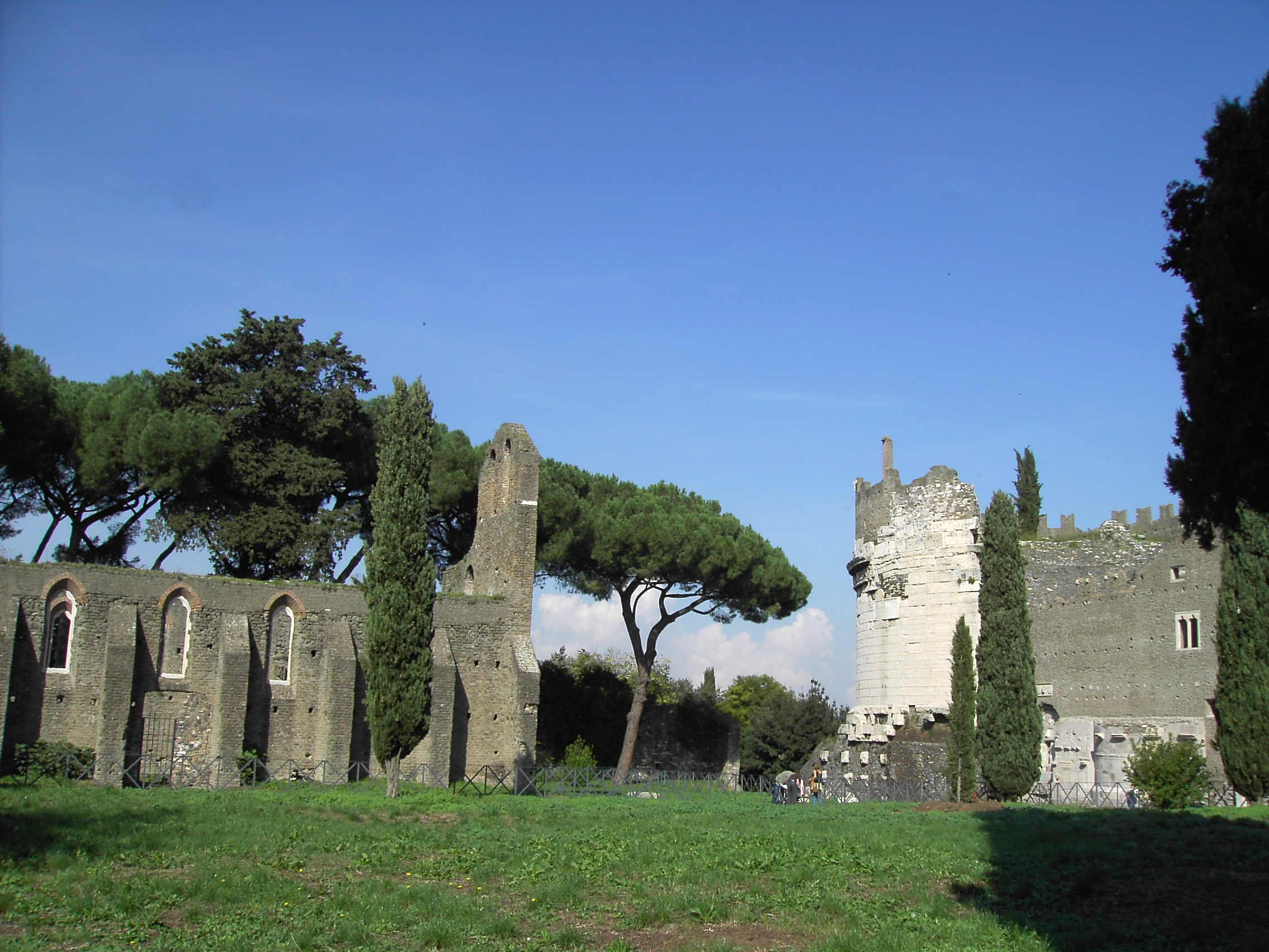 Roma, via Appia Antica: mausoleo di Cecilia Metella e chiesa di San Nicola by Lalupa